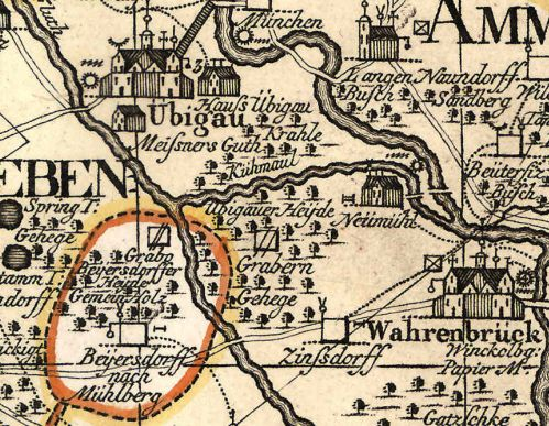 Kartenausschnitt/ Die Ämter Liebenwerda und Schlieben im 18. Jahrhundert